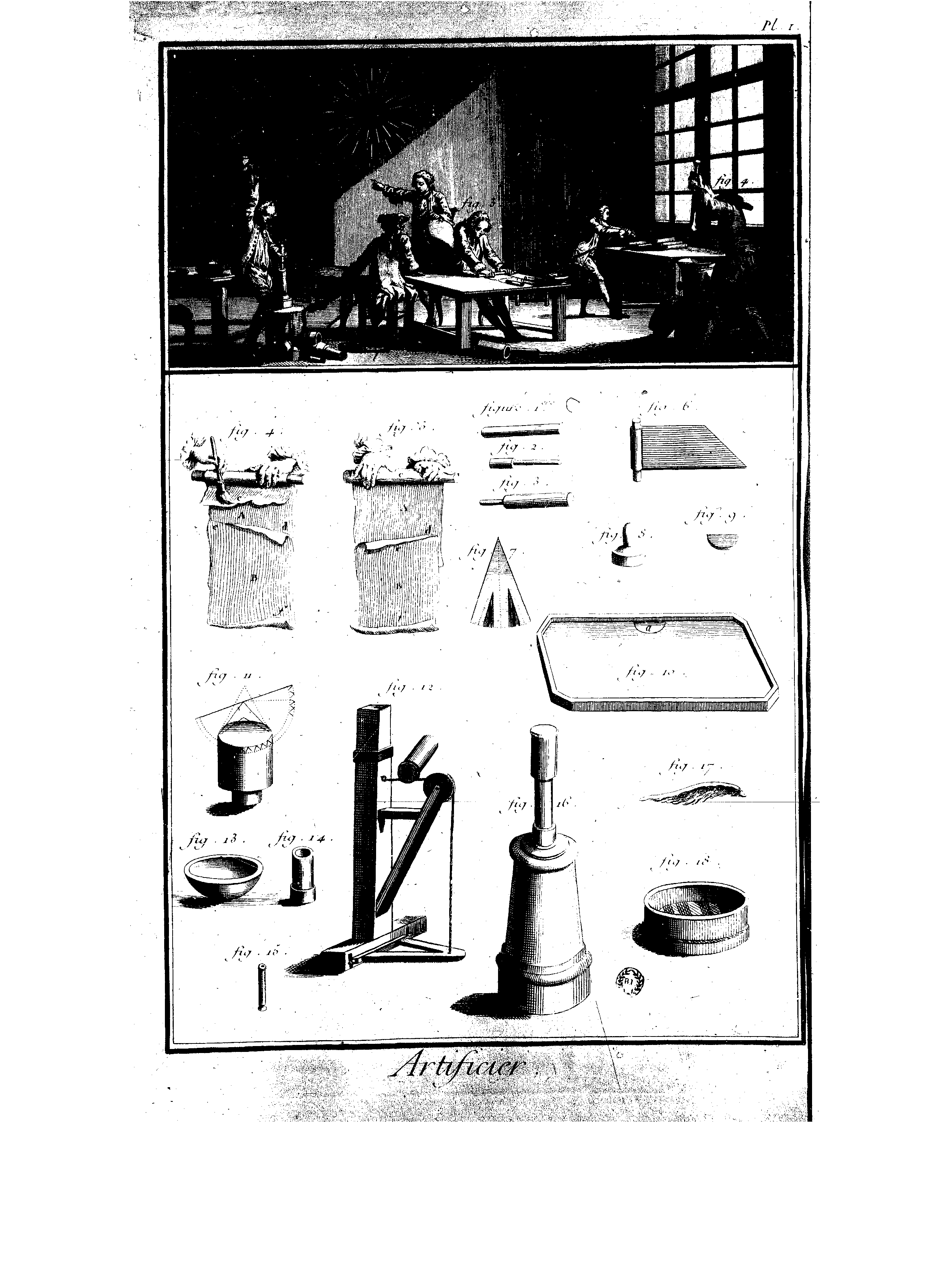 Planches de l'Encyclopédie de Diderot et d'Alembert, volume 1